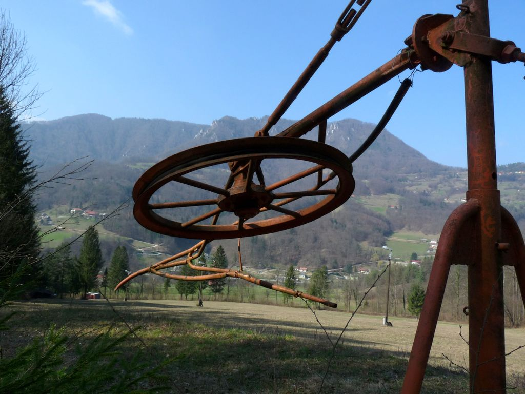 Žičnica nad Obrežjem, zadaj Kopitnik.